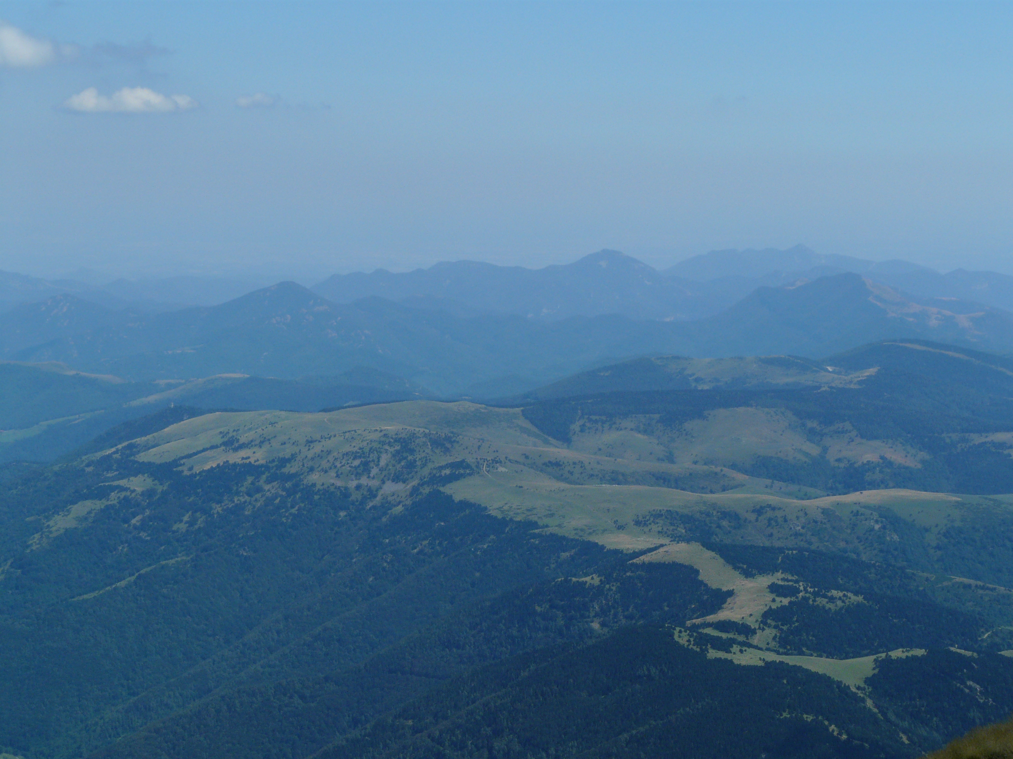 Imatge presa en una pujada al Costabona des de la Collada Fonda.